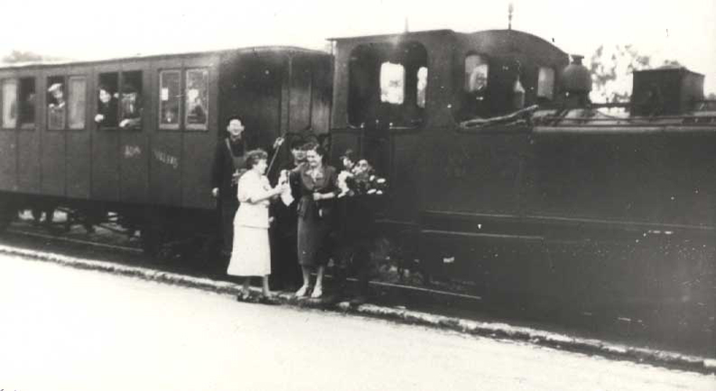 train de Villers sire Nicole. Ligne arrétée en 1951. Compagnie du Chemin de fer de Maubeuge à Villers-Sire-Nicole